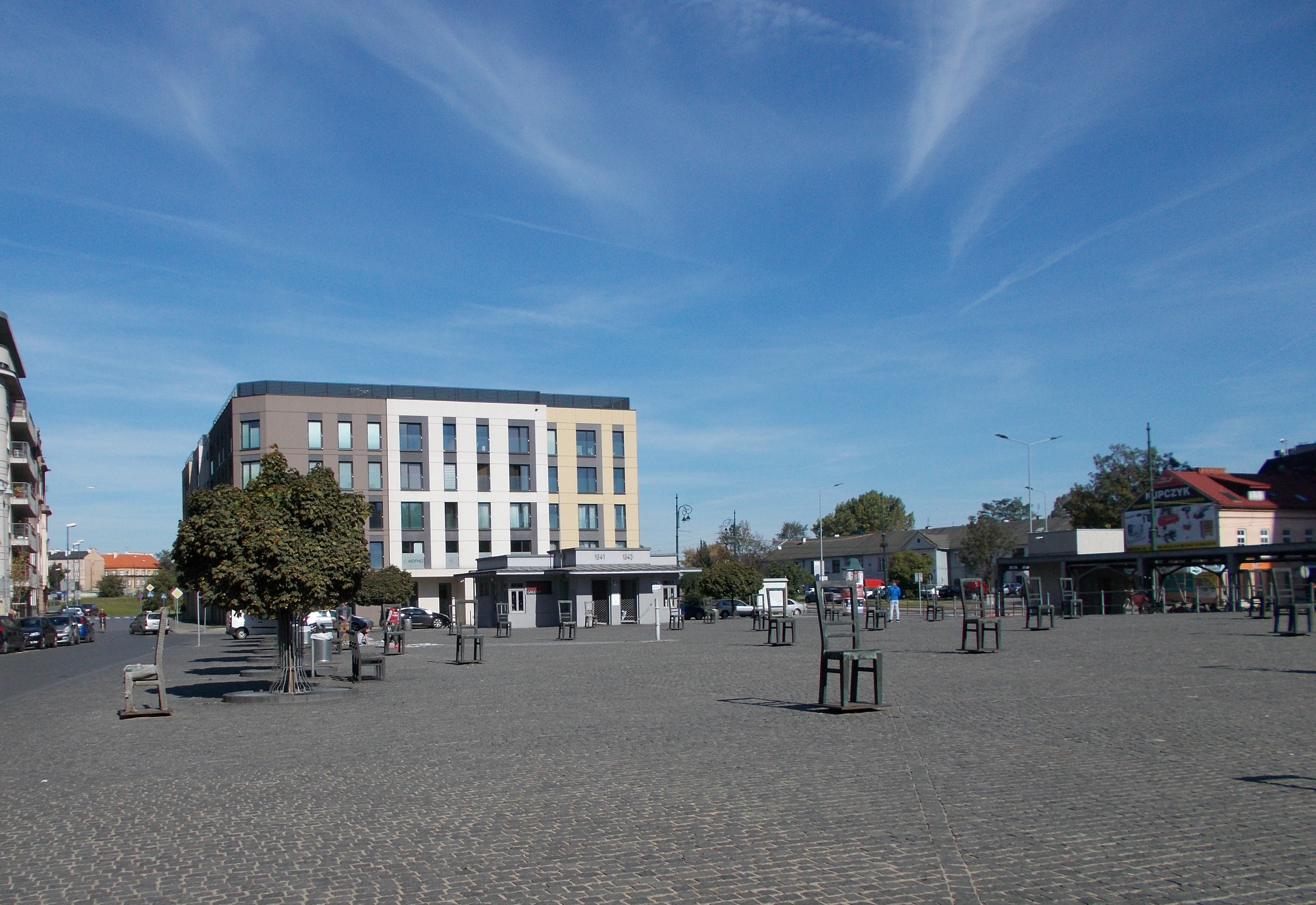 Krakau – Denkmal/Mahnmal aus Stühlen auf dem Platz der Ghettohelden - früherer Platz der Einheit - (Polen)